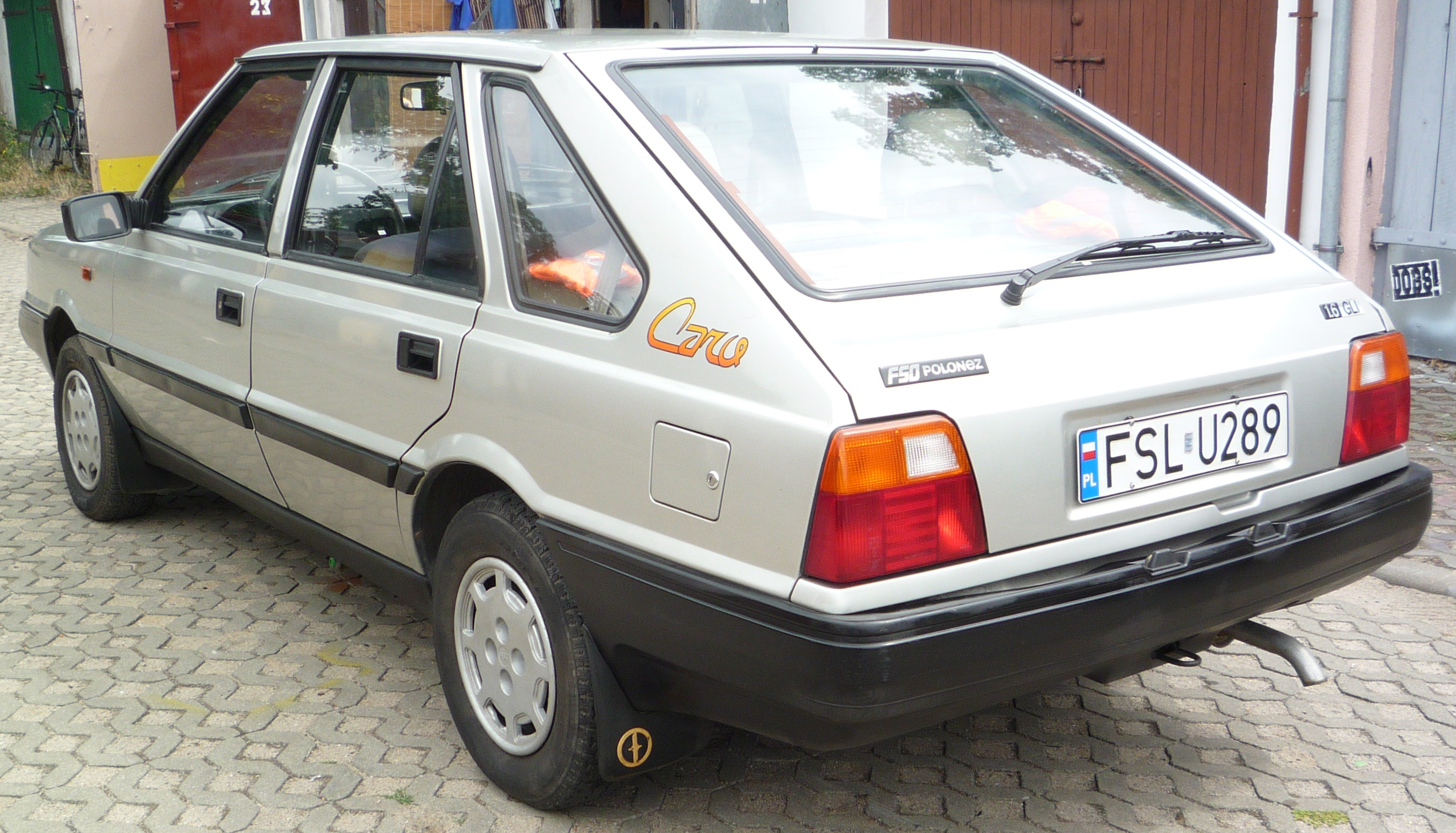 FSO Polonez Caro 1.6 GLI z 1996 roku.